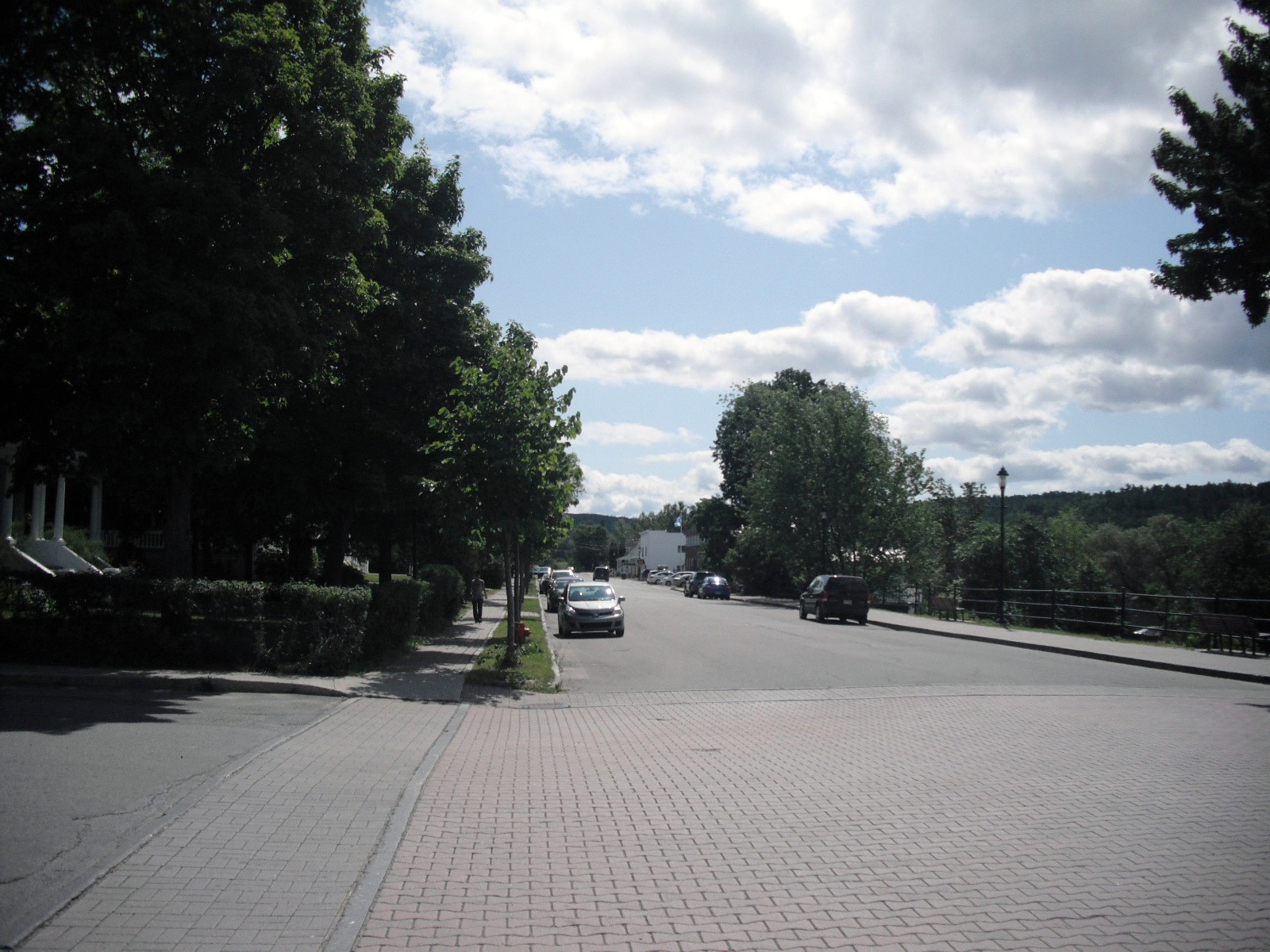 Vue sur la rue Notre-Dame Sud, dans la section sud de la partie urbaine de Ville-Marie, au Témiscamingue, au Québec.